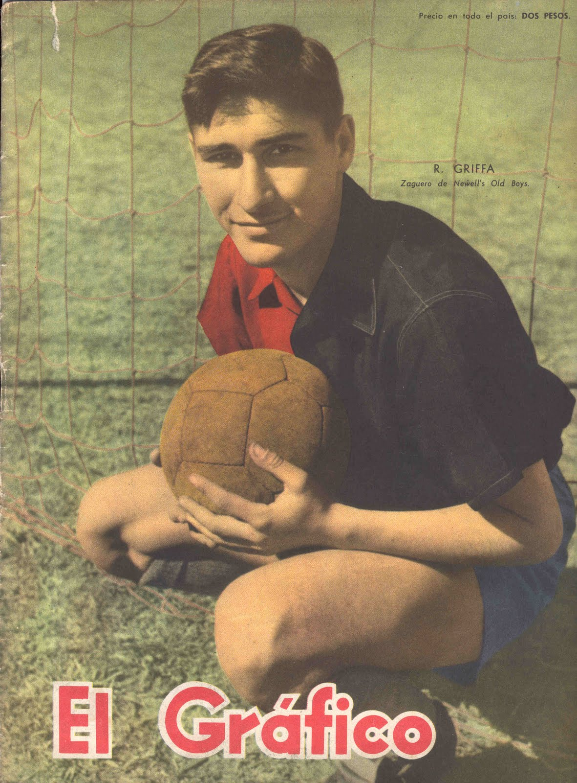 Tapa revista El Gráfico con Jorge Griffa como zaguero de Newell's Old Boys, año 1956